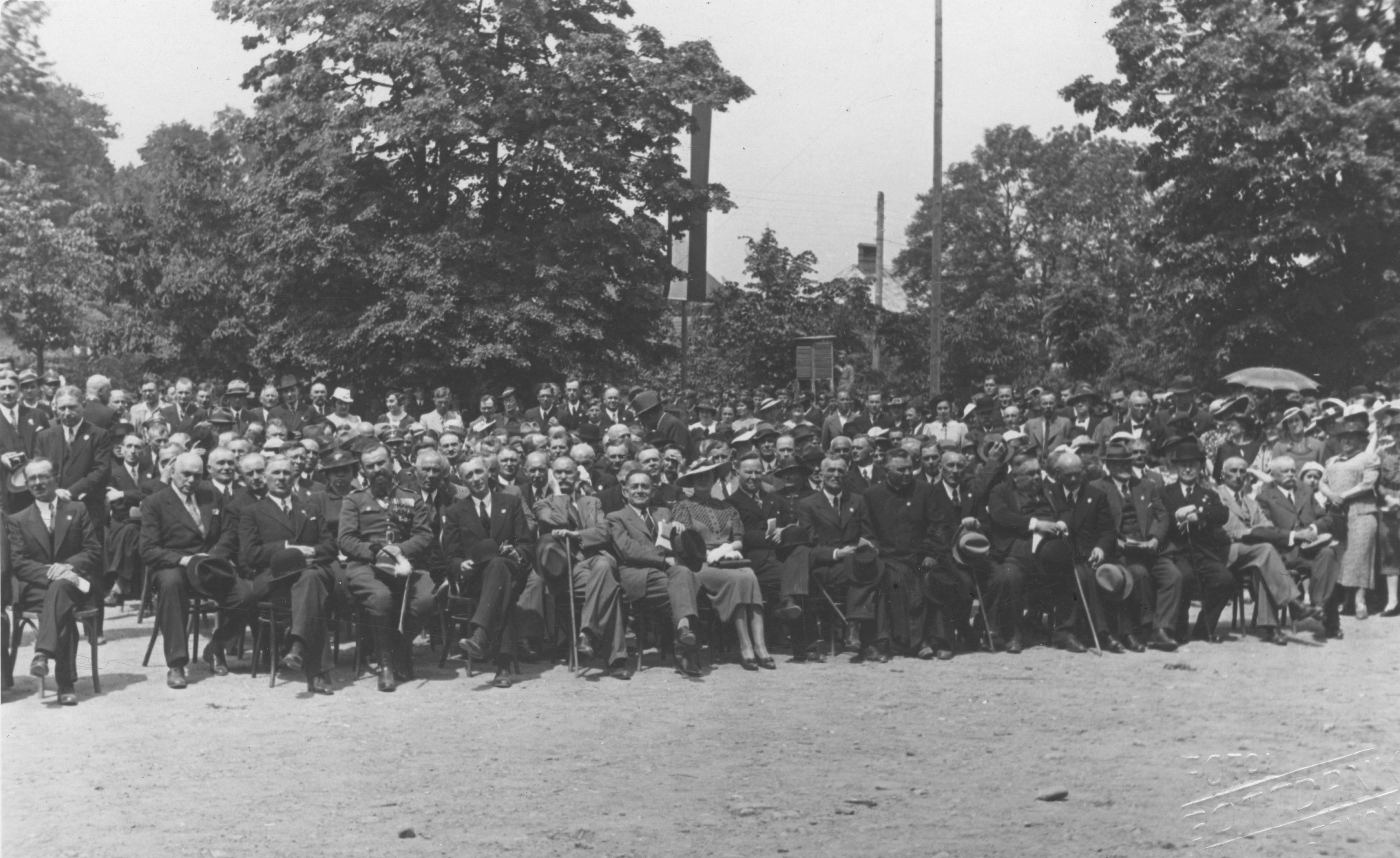 Zjazd absolwentów Państwowego Gimnazjum im. Królowej Zofii w Sanoku w jubileusz 50-lecia szkoły w 1938. Fotografia grupowa uczestników zjazdu. W pierwszym rzędzie od lewej: Izasław Fell (2), Wojciech Bucior (3), płk Zygmunt Cšadek (4), Juliusz Zaleski (5), Zofia Skołozdro (8).